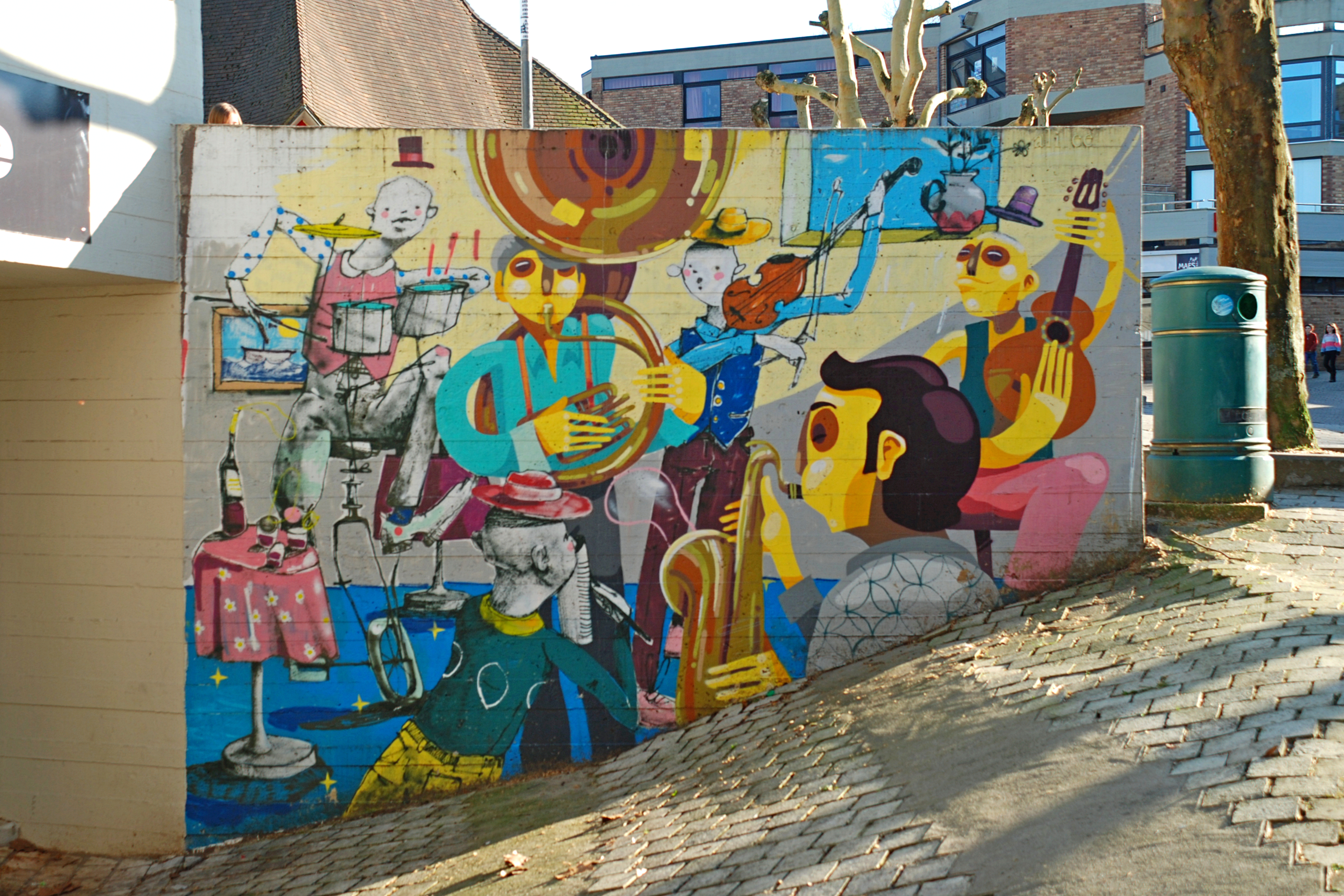 Belgique - Louvain-la-Neuve - Place Galilée - Fresque de Zësar et Mart Aire (Kosmopolite Art Tour 2015 à Louvain-la-Neuve)